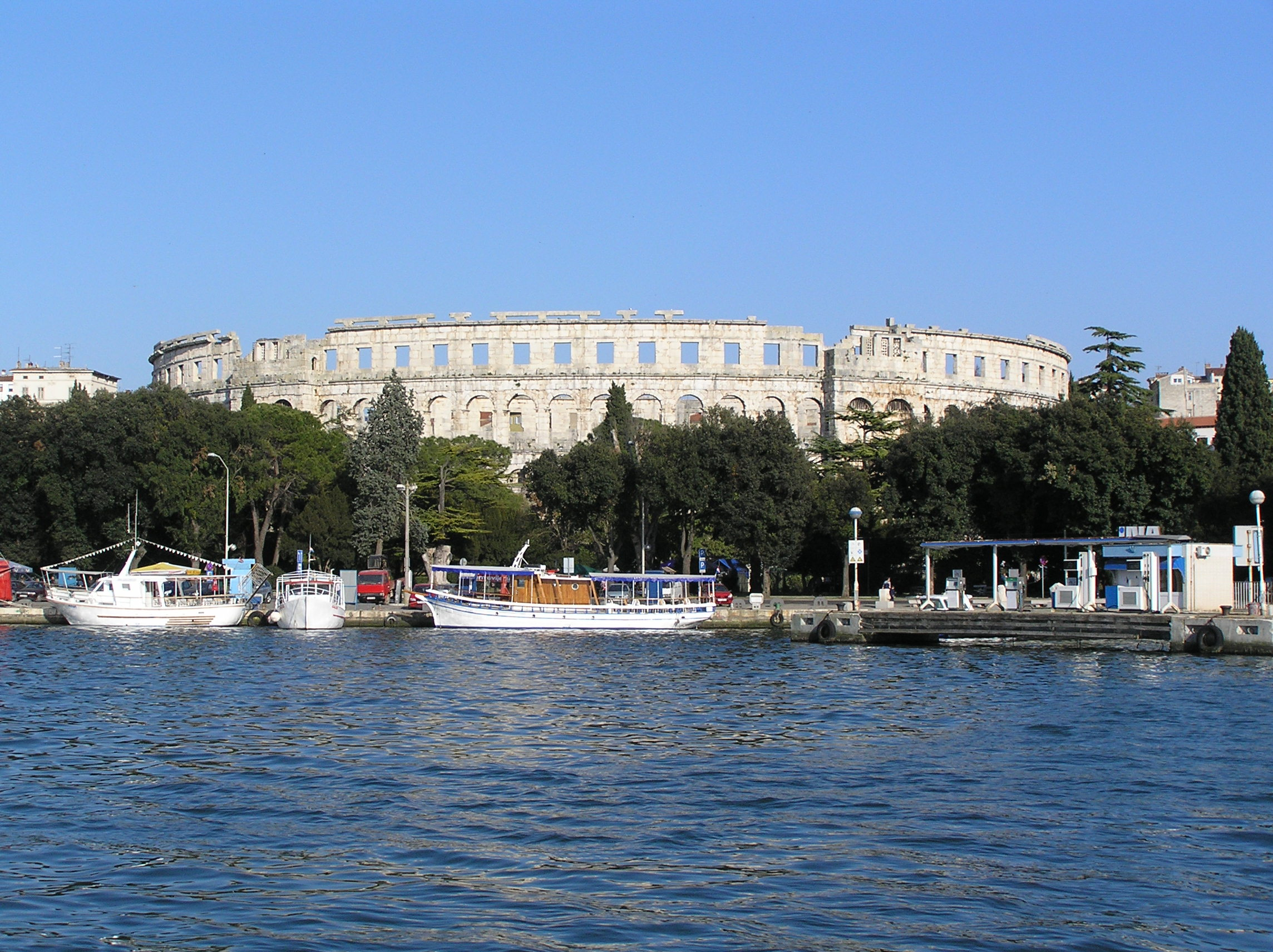 self-made